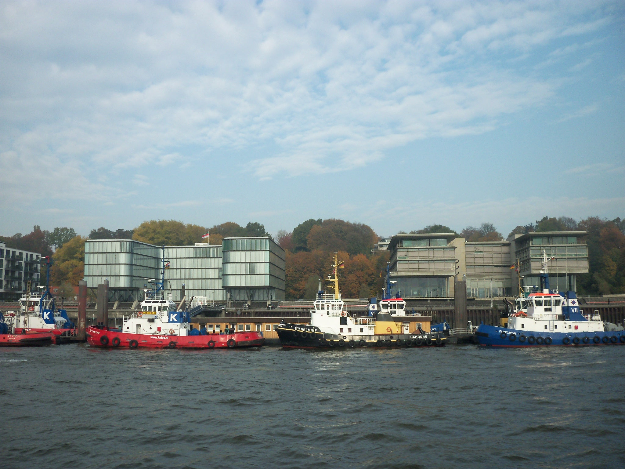 Bürogebäude in Hamburg-Altona, Neumühlen